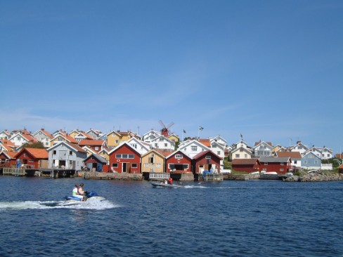 Wassersportler, Insel Tjörn, Bohuslän, Schweden P. Schmidtke (2003)